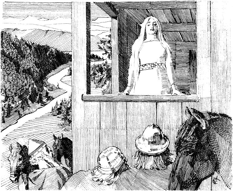 Christian Krogh: Illustration for Harald Hårfagres saga, Heimskringla 1899-edition. nn: «Gyda svarar sendemennene til kong Harald.» nb: «Gyda sender bud til kong Harald.»